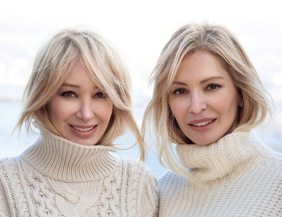 Abivardi Schwestern; Haleh Abivardi (links), Golnar Abivardi (rechts)